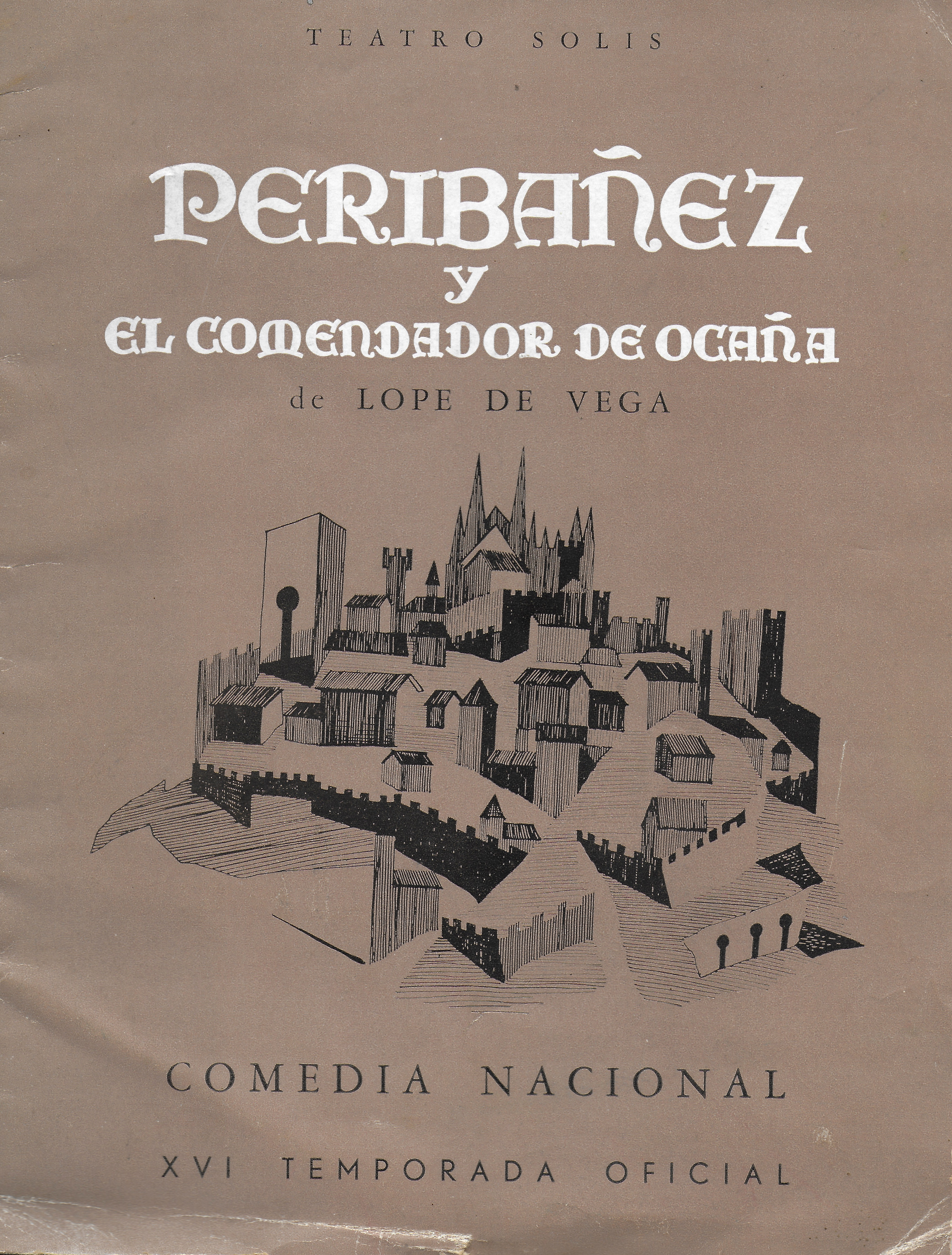 Programa de mà teatro Solís 1962 Peribañez y el comendador de Ocaña 1926